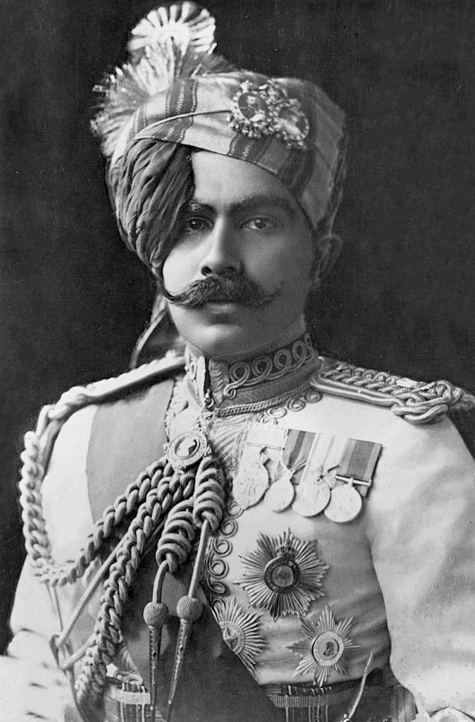 The Maharajah Ganga Singh of Bikaner (1880 - 1943).